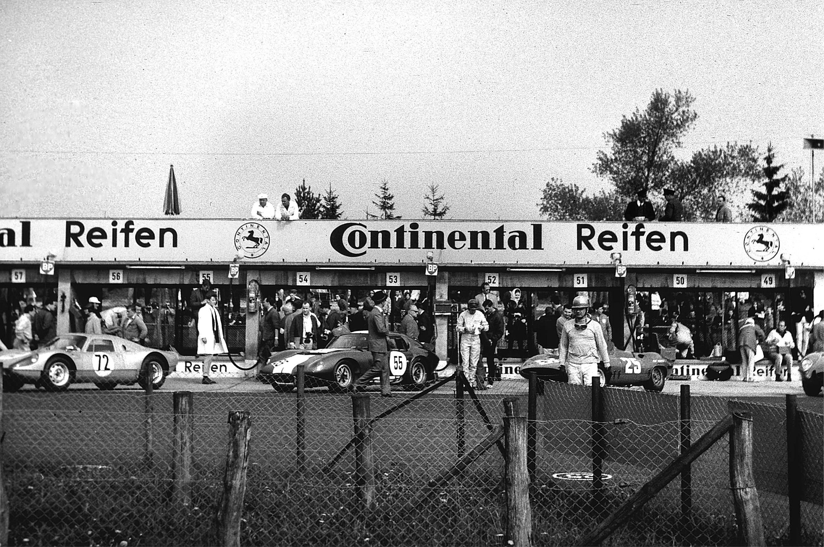 Le-Mans-Start 1 - Die Fahrer stellen sich auf